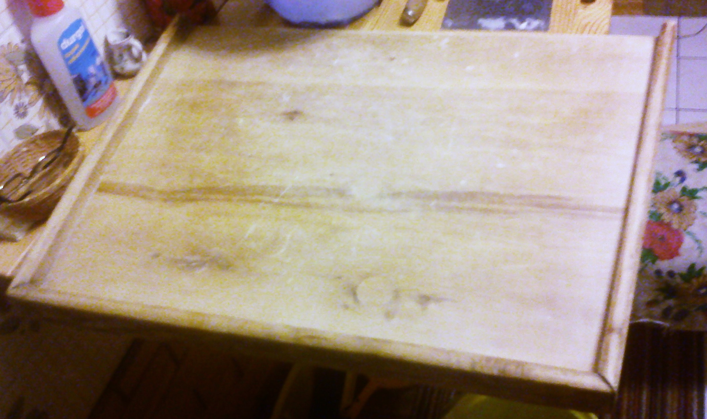 Stolnica do wyrabiania ciast.